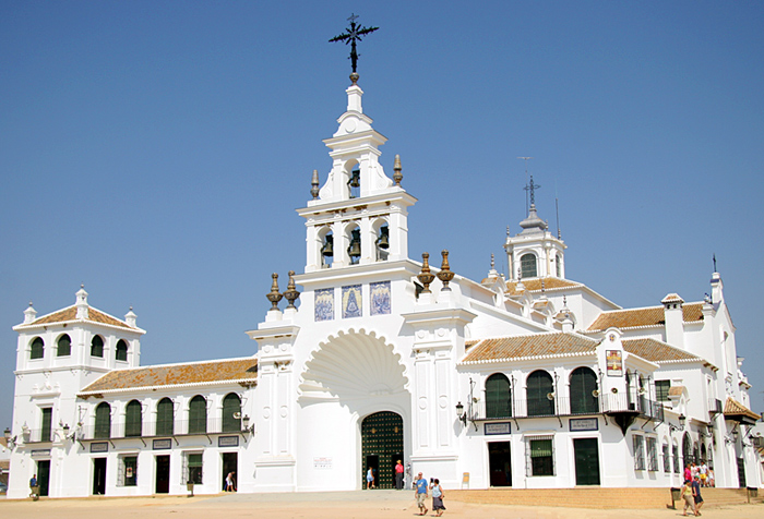 El Rocio, Huelva, Spain.